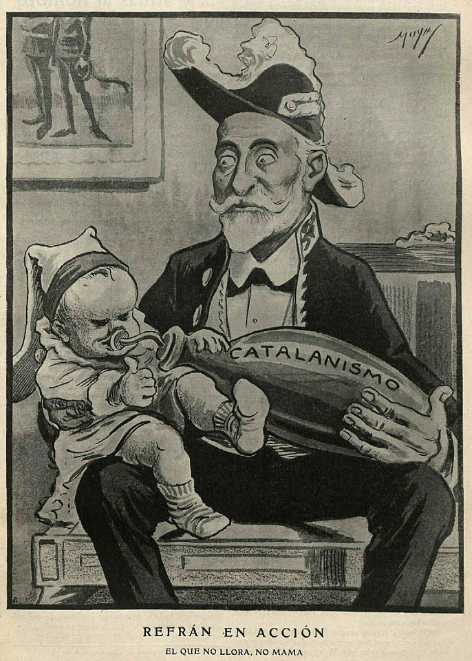 Refrán en acción, en la revista satírica española Gedeón.